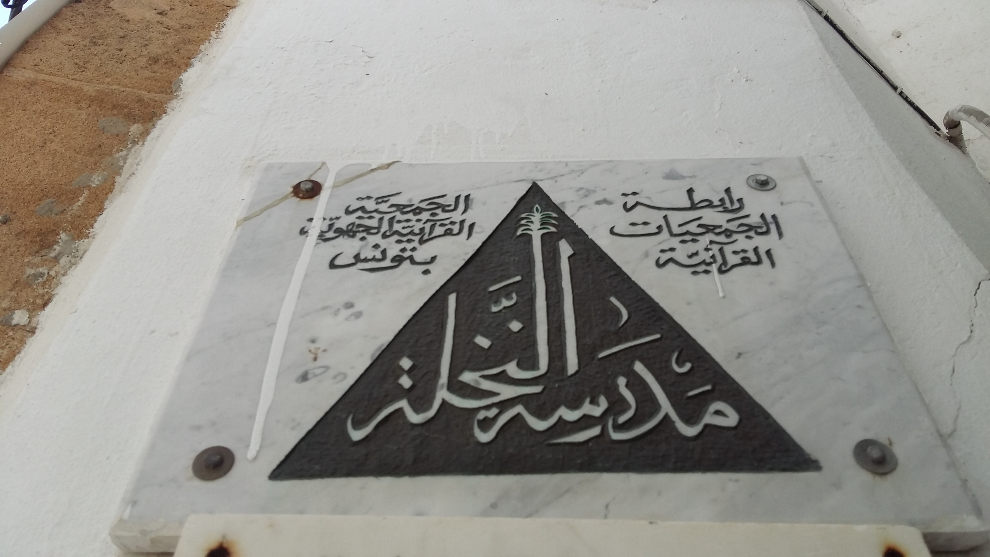 Medersa Ennakhla